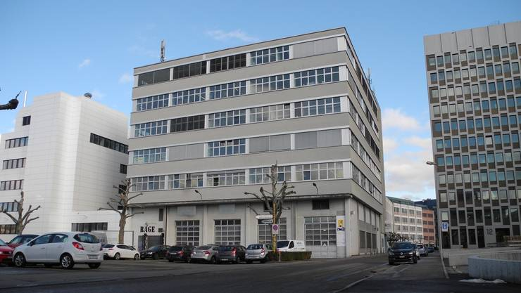 Museum